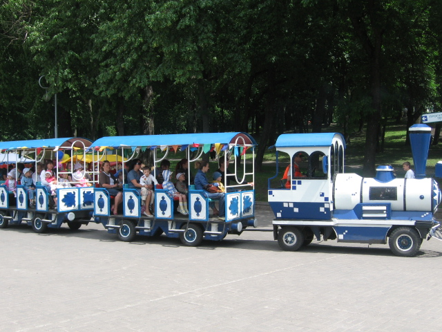 РБ, Минск, паровоз в парке горького